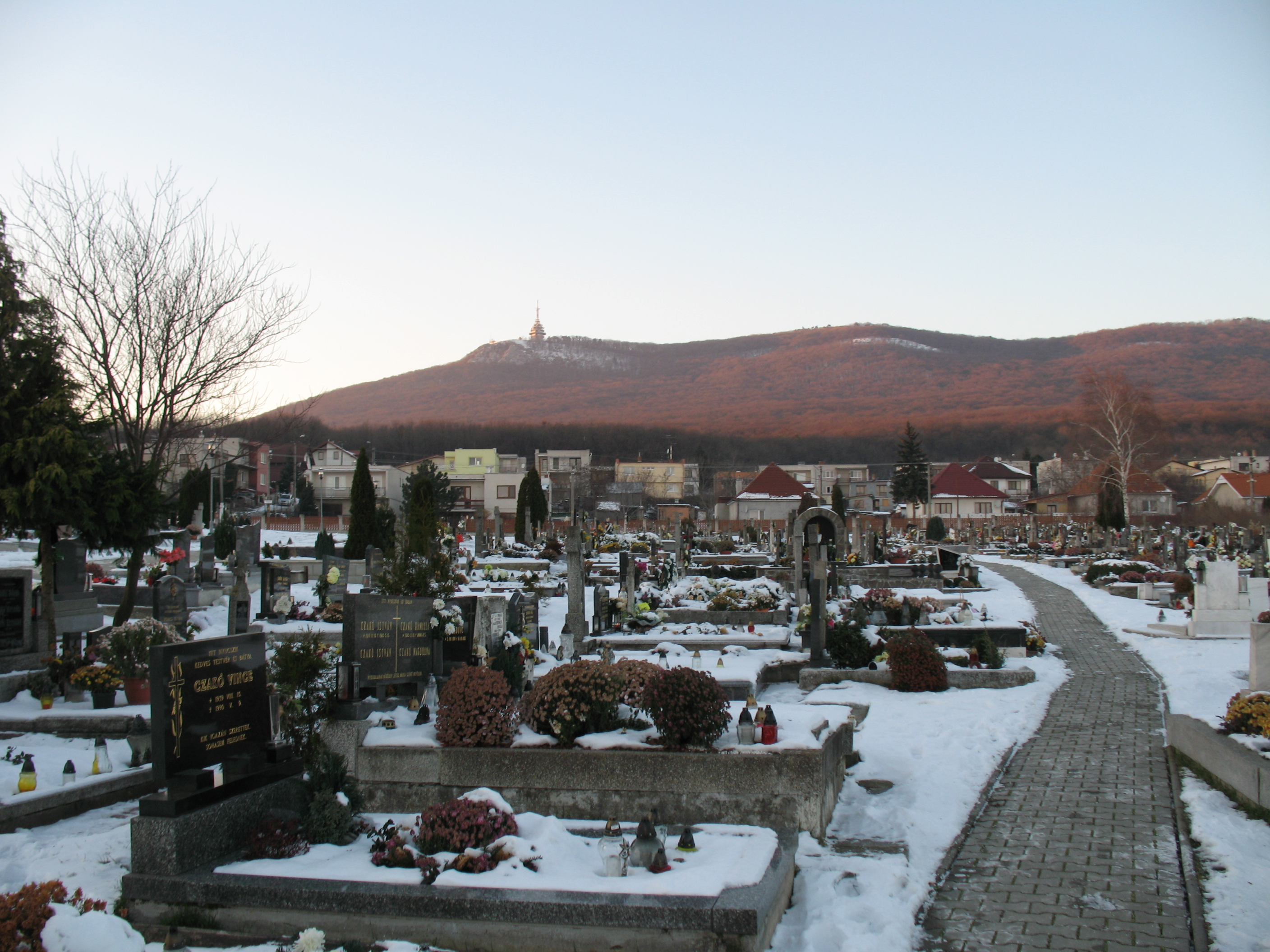 Nyitragerencsér